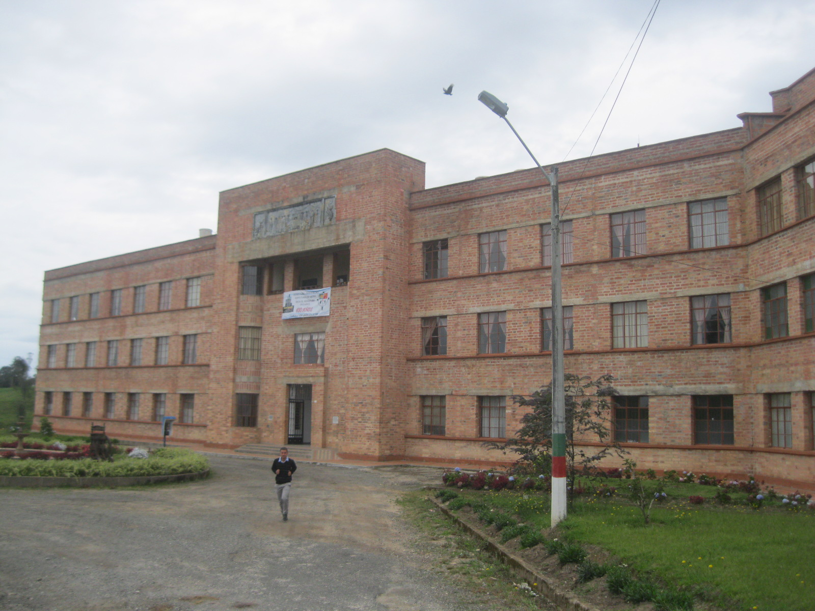 esta foto fue tomada en una capacitación de infancia misionera, proceso que lleva acabo la diócesis de santa rosa de osos antioquia